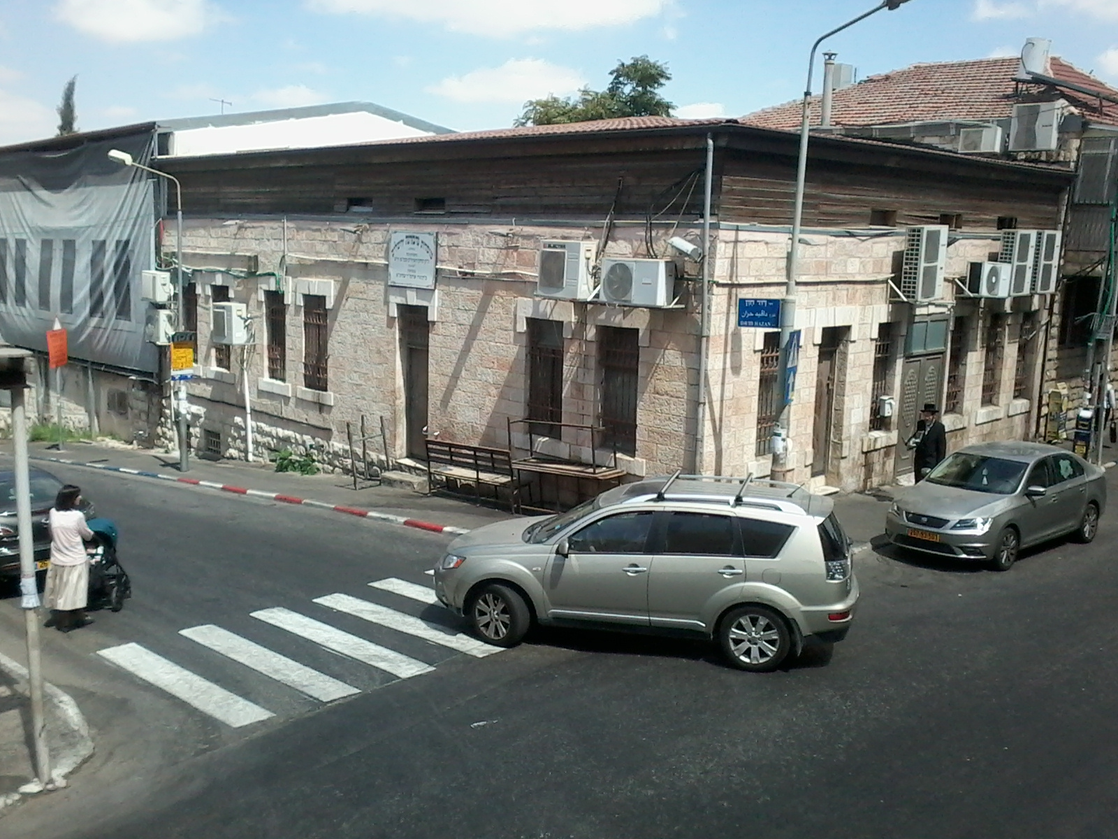 בית המדרש של חסידות נדבורנה ברחוב דוד חזן בירושלים